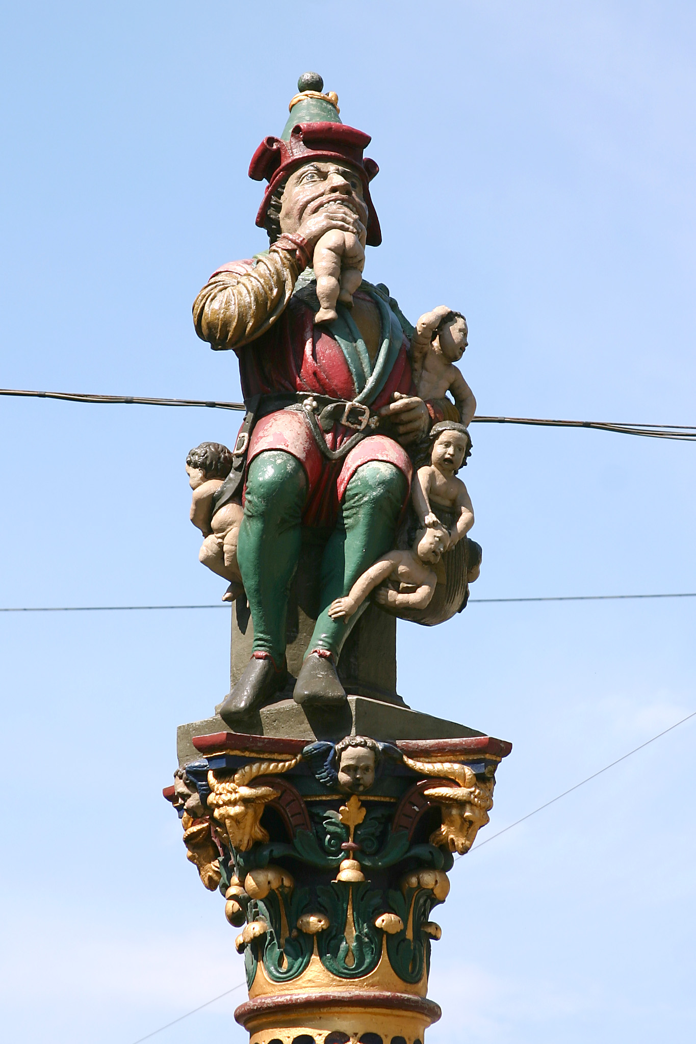 Kindlifresserbrunnen, Bern, Switzerland